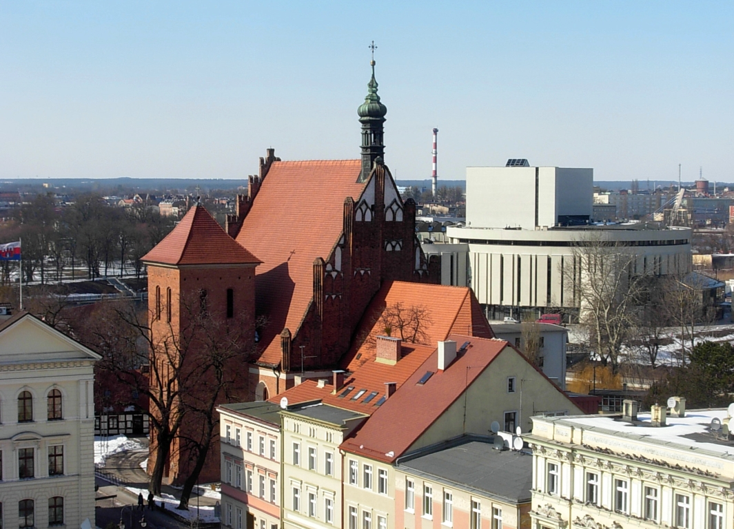 Stare Miasto w Bydgoszczy, katedra pw. św. Marcina i Mikołaja